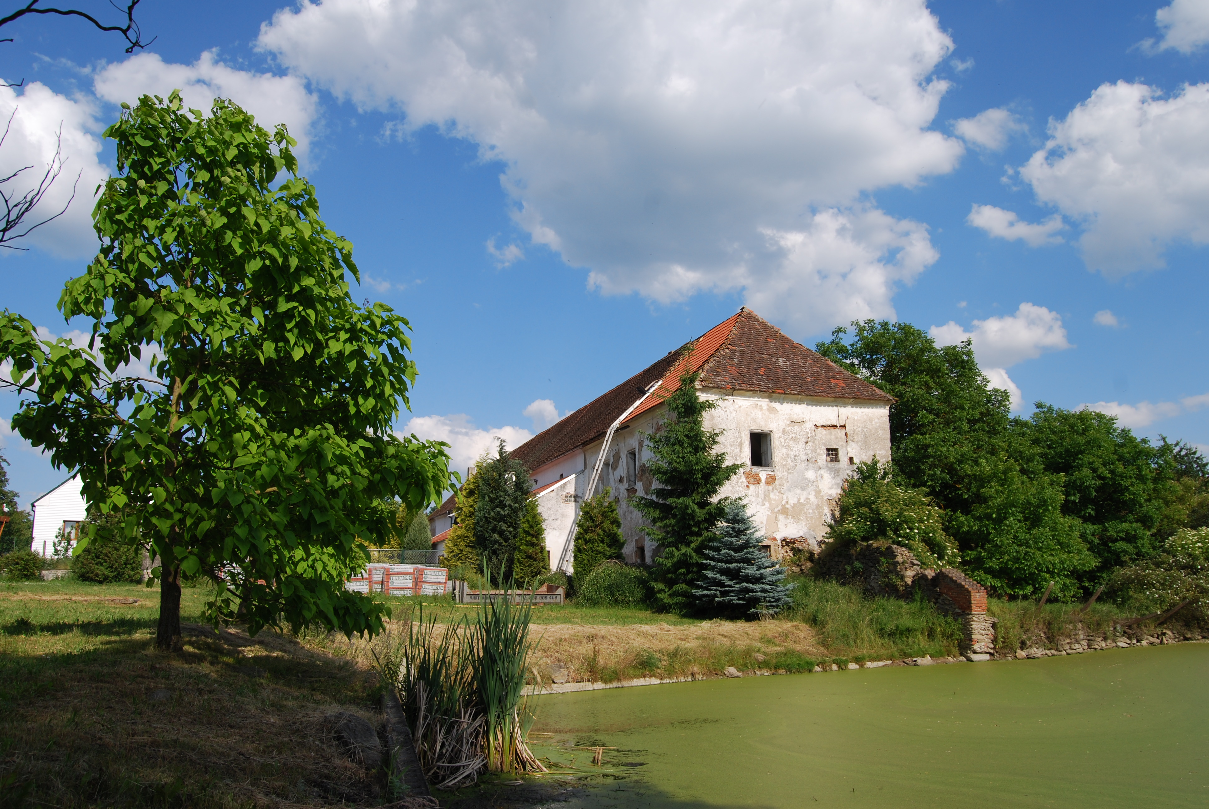 Tvrz. Kožlí u Čížové - část obce Předotice v okrese Písek. Písek. Jihočeský kraj. Česká republika.